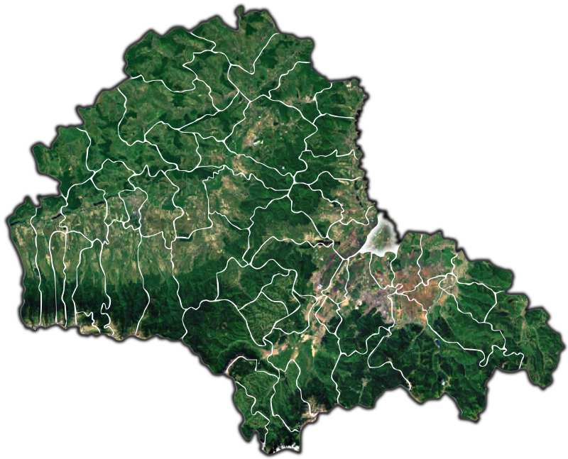 Bod jud Brasov